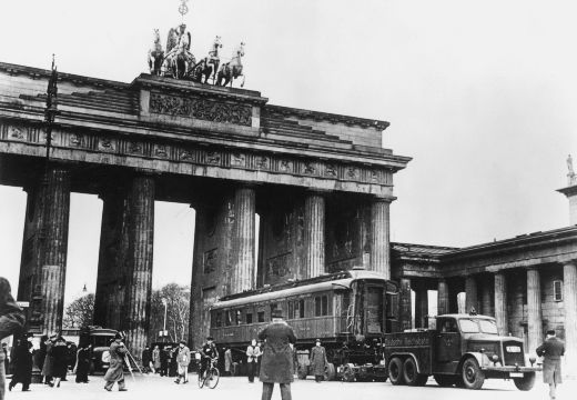 Juin 1940 Wagon de l'armistice frachissant la porte de Brandebourg à Berlin